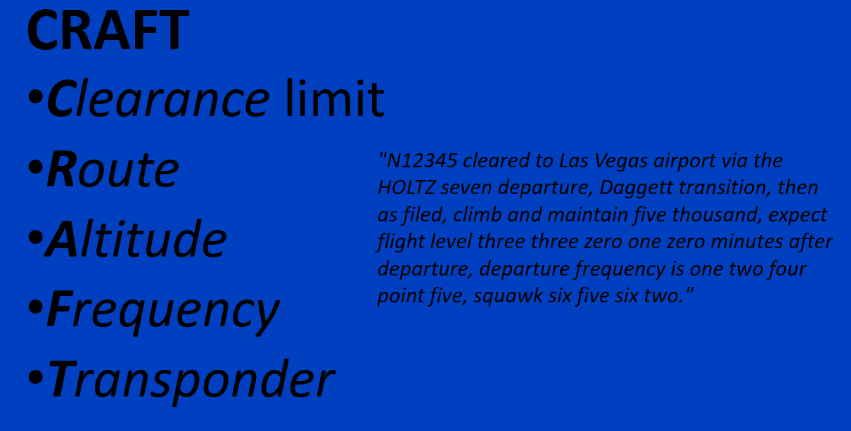 CRAFT Example